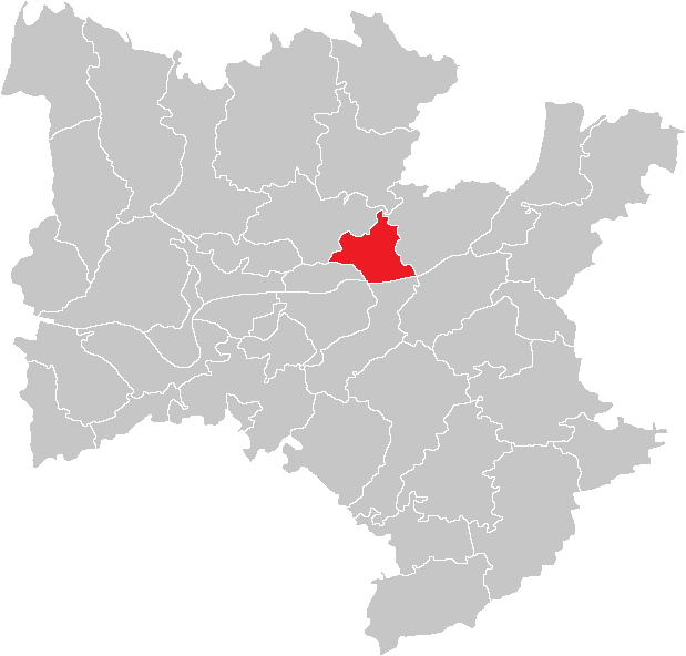 Bezirk Melk